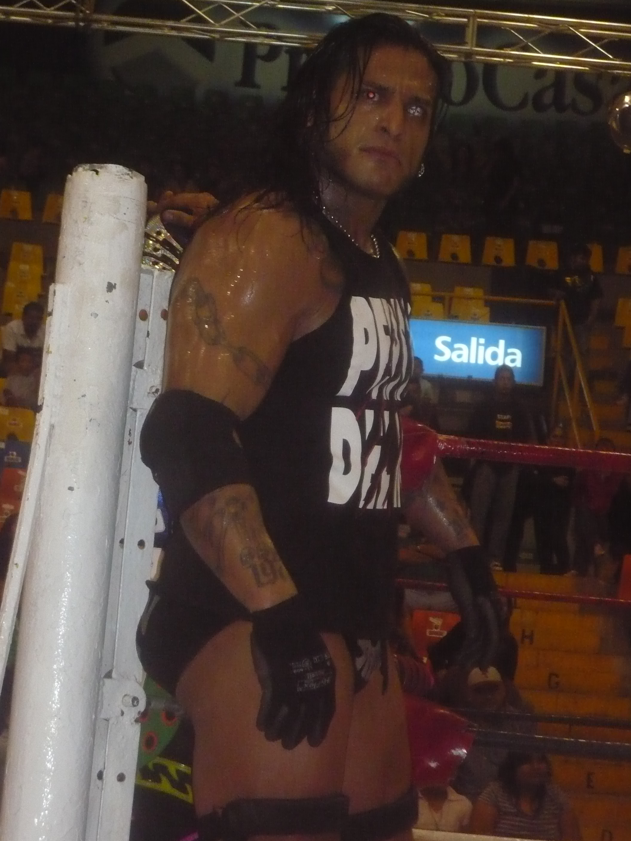 Foto tomada durante la gira de la Triple A, en el Palenque Promocasa del FEX